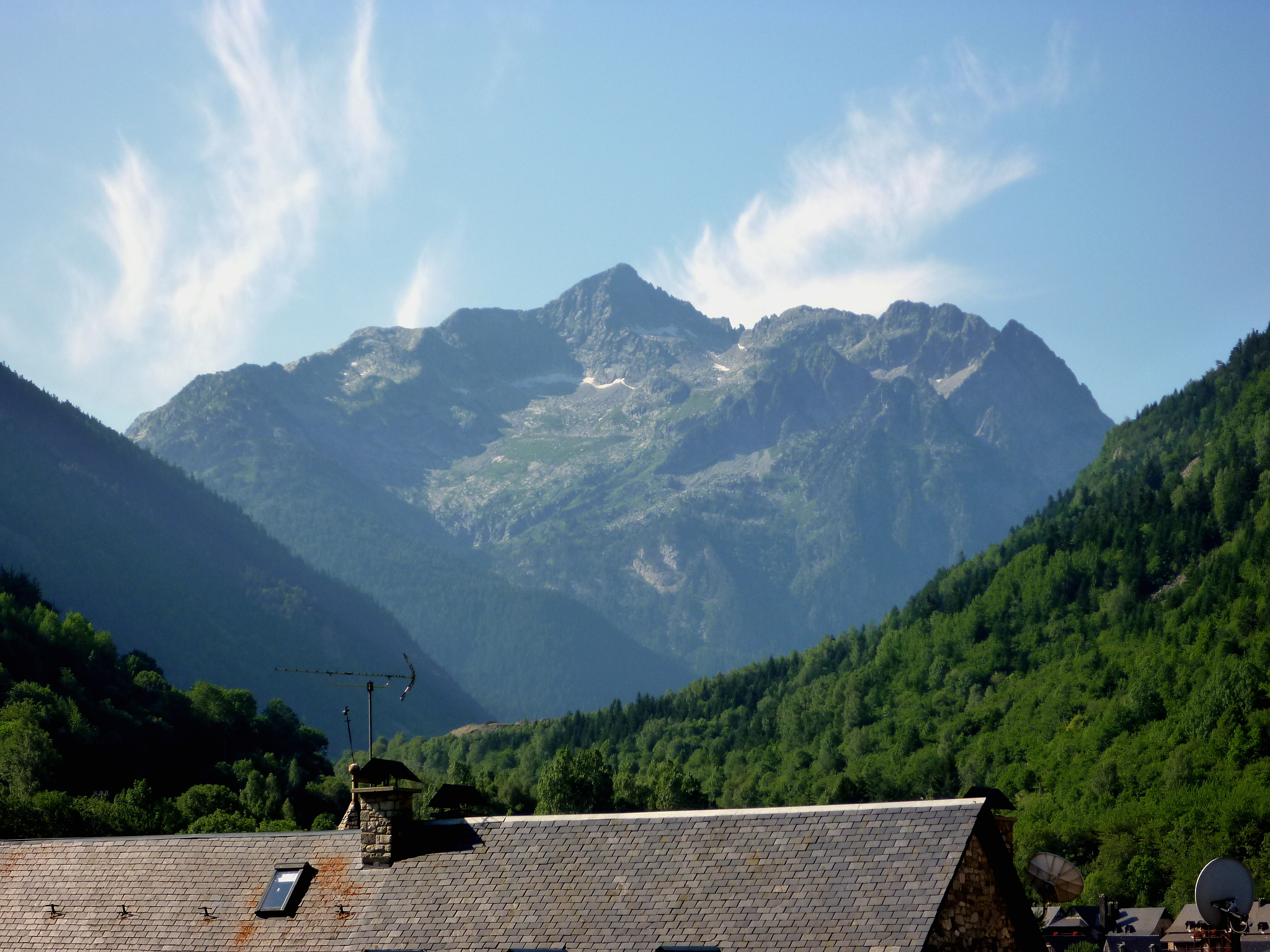 El Montardo des d'Arties (Naut Aran - Val d'Aran)